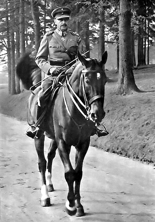 Mannerheim aamuratsastuksella. Alla ruuna Andermann.